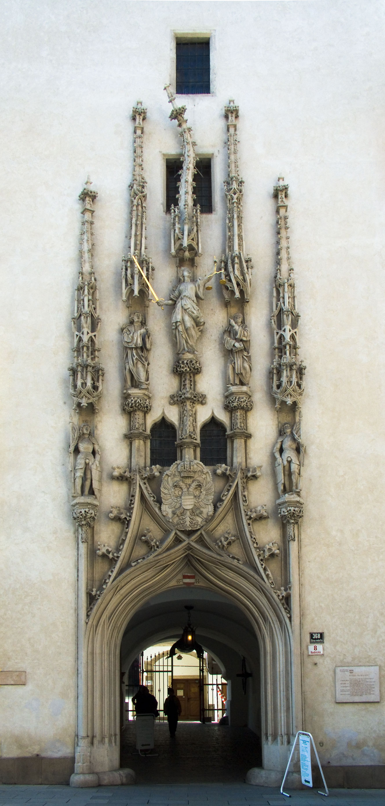 Stará radnice - hlavný portál průchodu v Brně